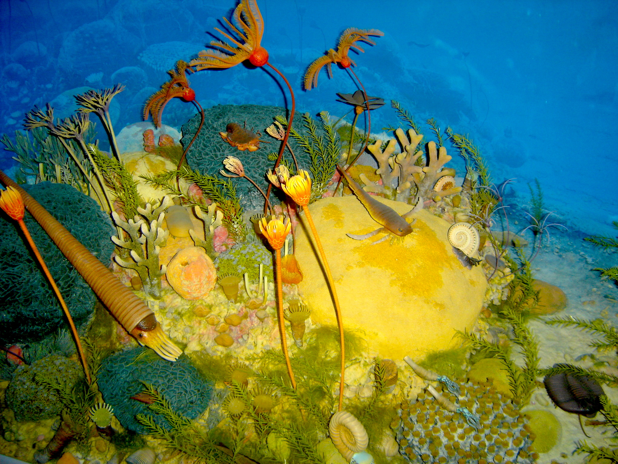 Fond marin au Silurien (image personnelle)